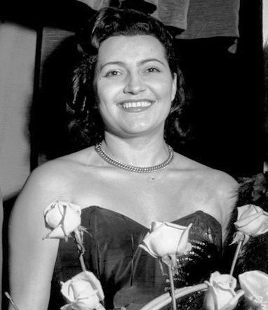 Primo piano di Nilla Pizzi, vincitrice del Festival di Sanremo 1952